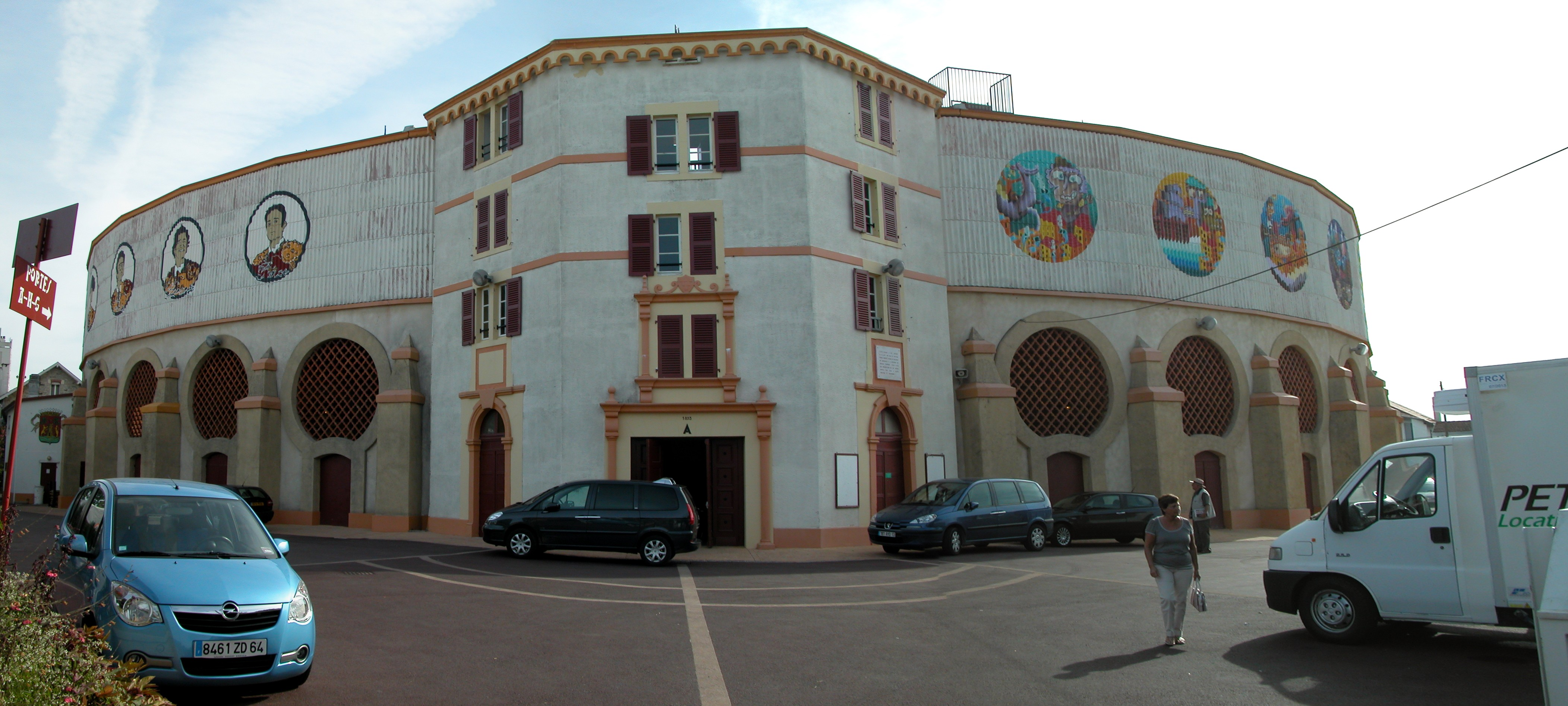 Les arènes de Bayonne vues de l'extérieur